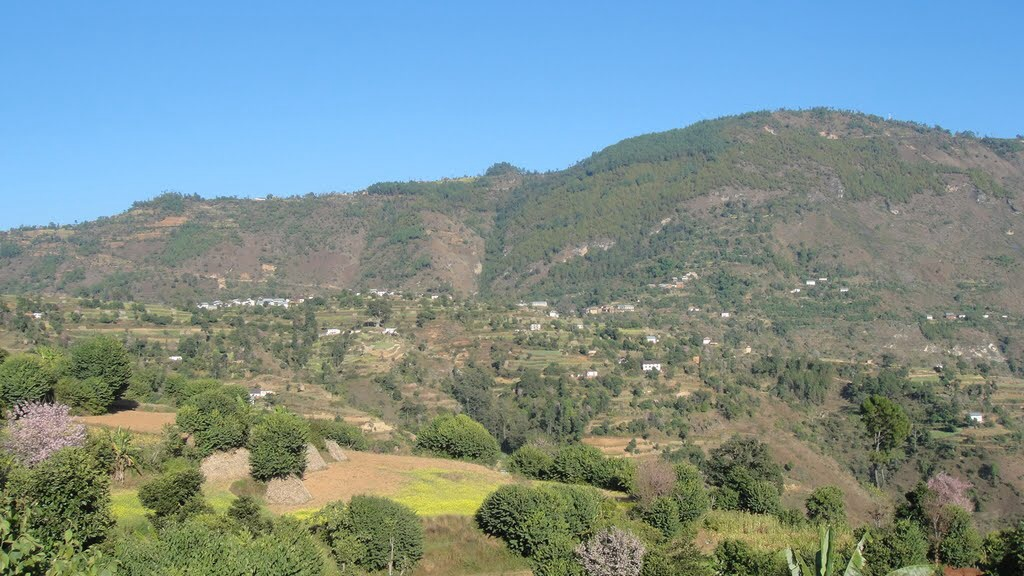 कानपुर काभ्े